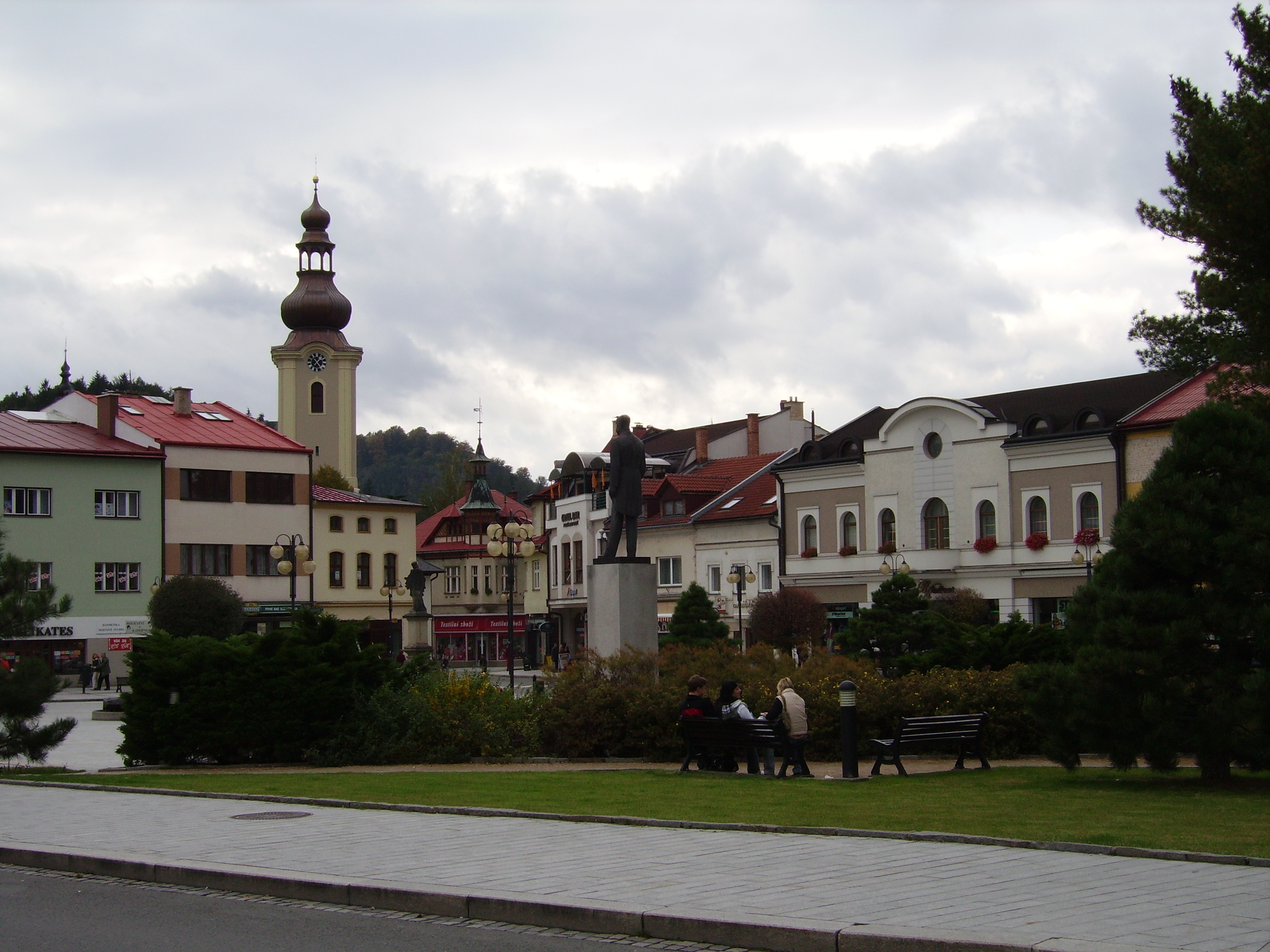 Rožnov pod Radhoštěm, hlavní náměstí